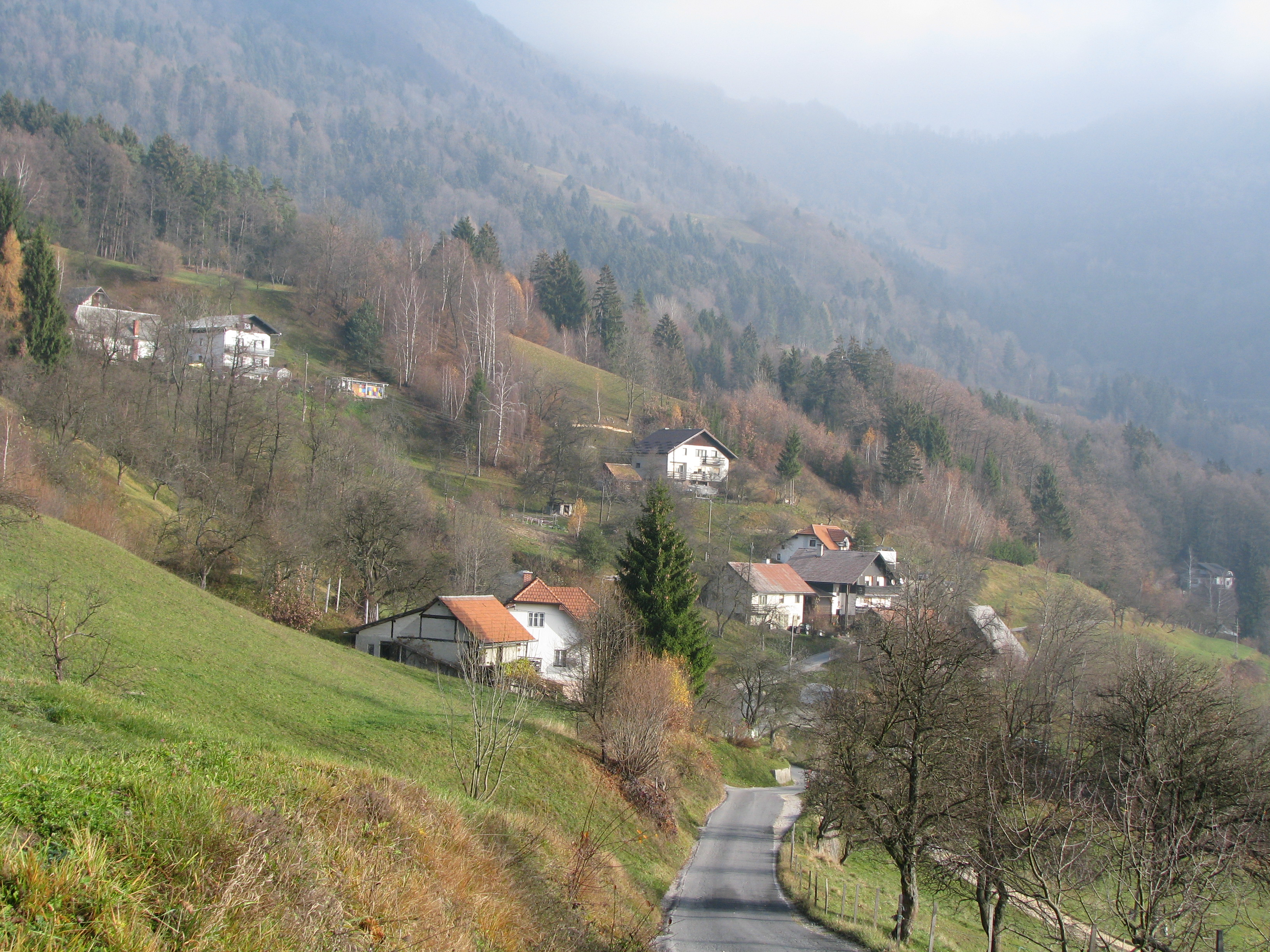 Čeče, cesta proti Mrzlici